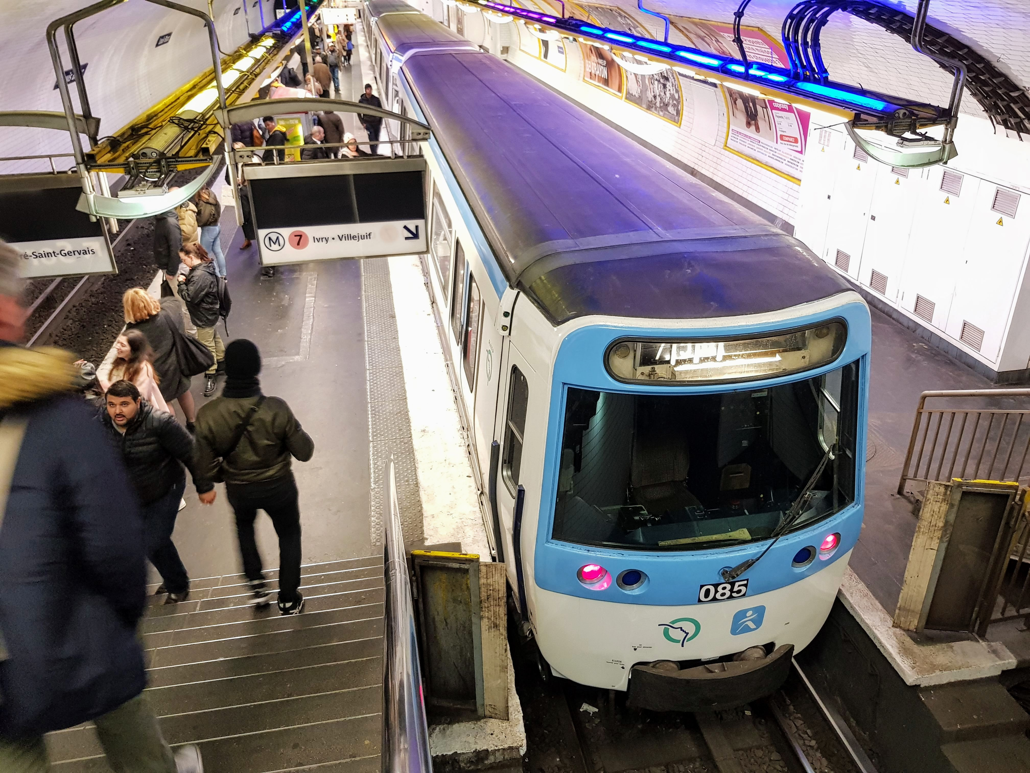 MF77 en livrée Île-de-France Mobilités à la station Louis Blanc.